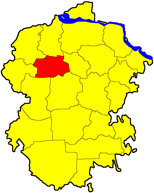 Аликовский район на карте Чувашии